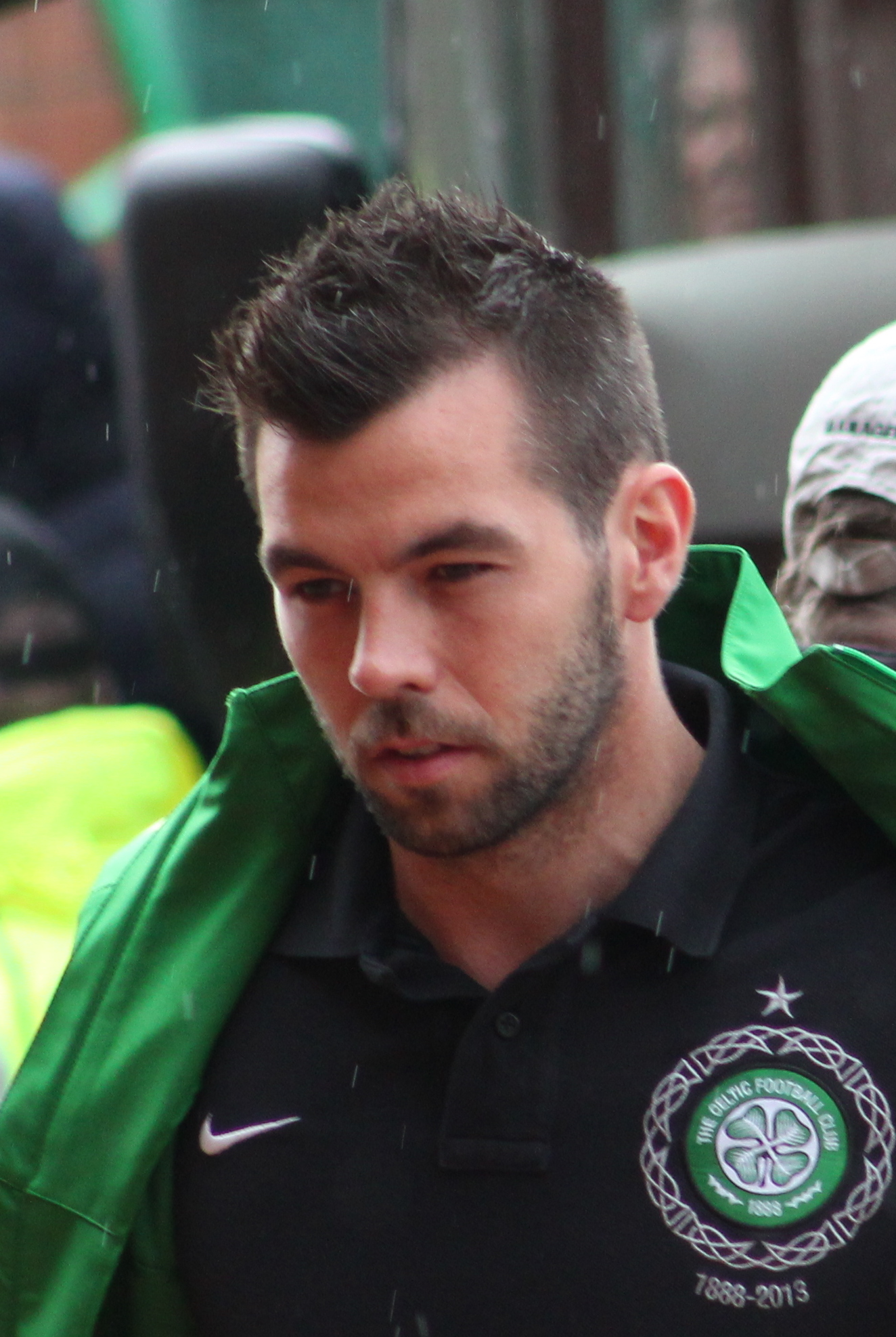 Joe Ledley